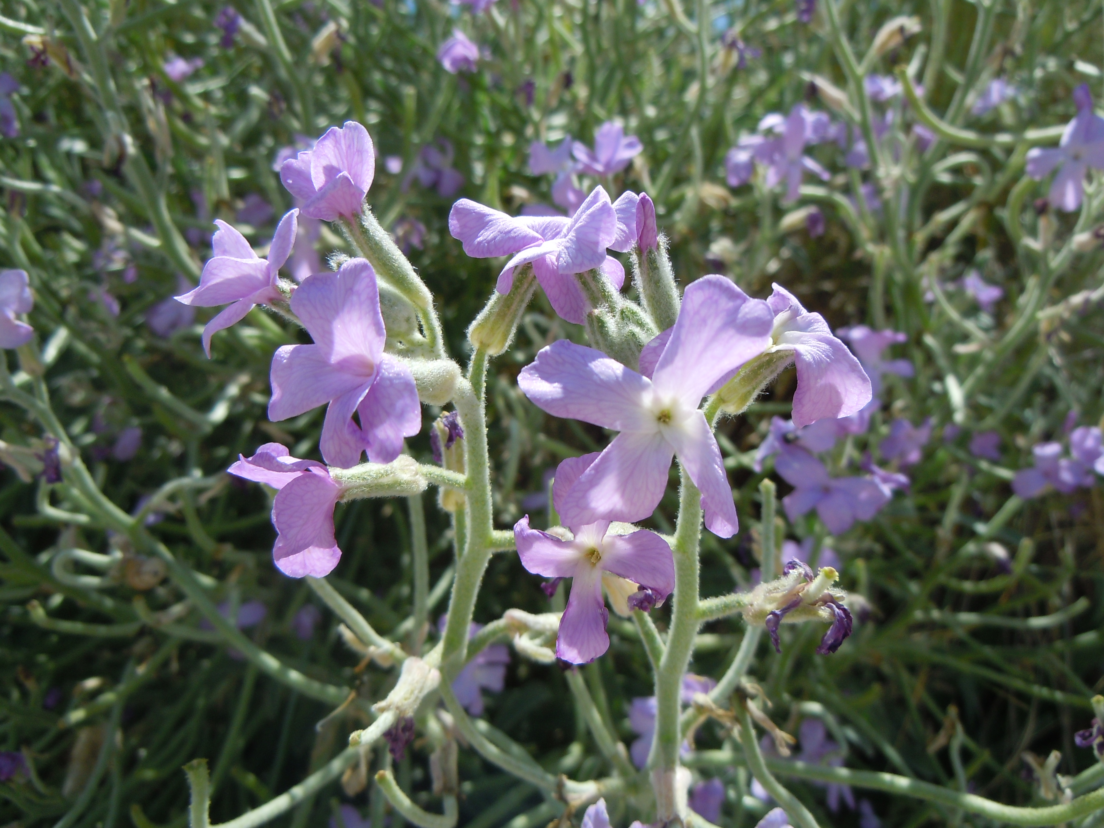 Giroflée des dunes - Matthiola sinuata à Belle-Ile